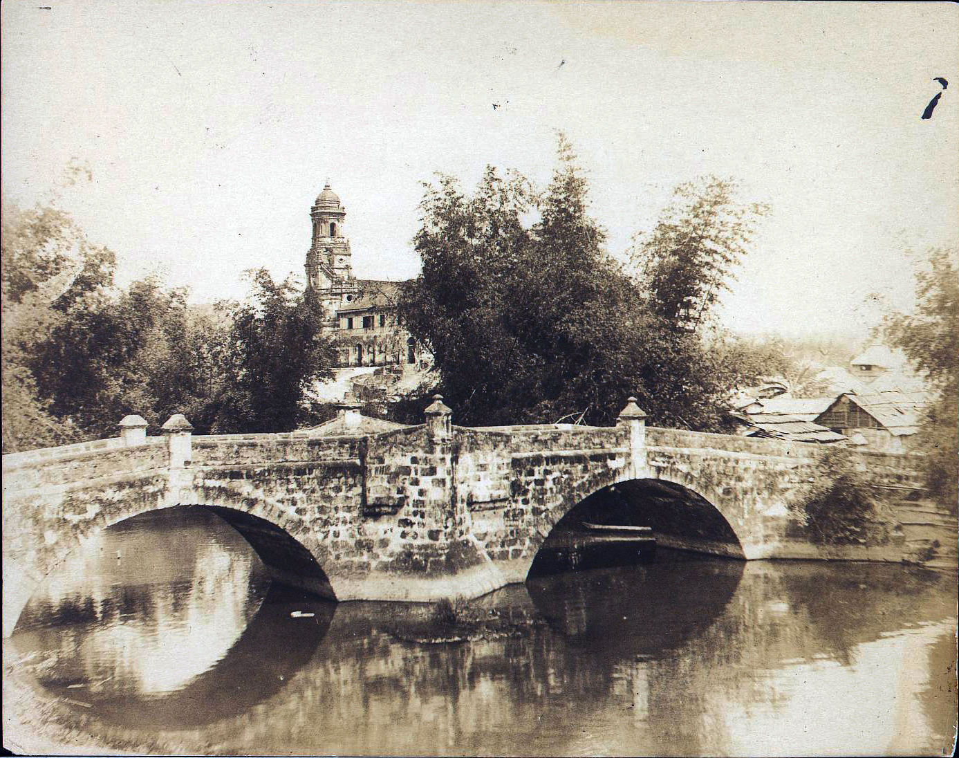 Morong, Rizal Philippines